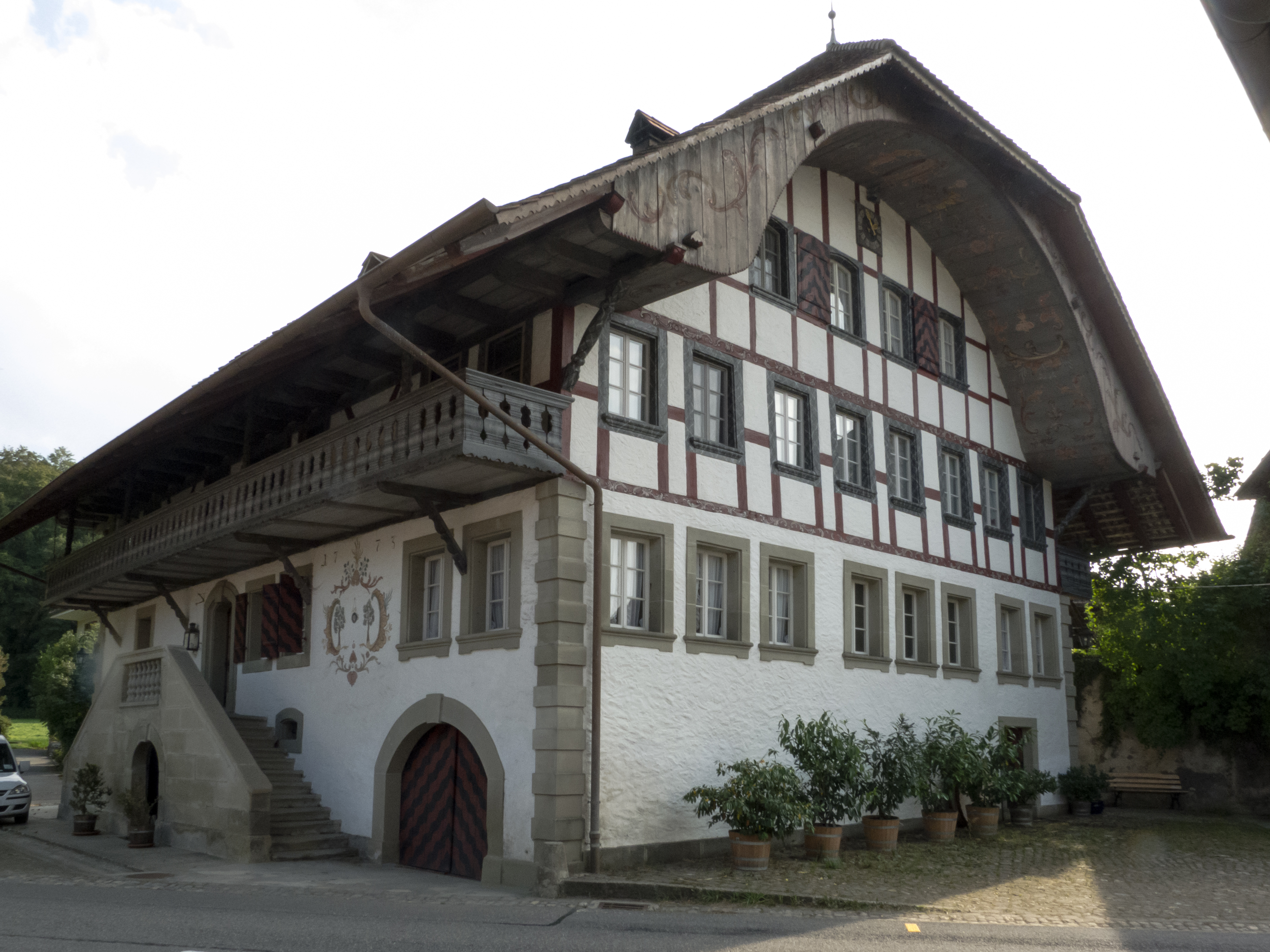 Ehemalige Getreidemühle